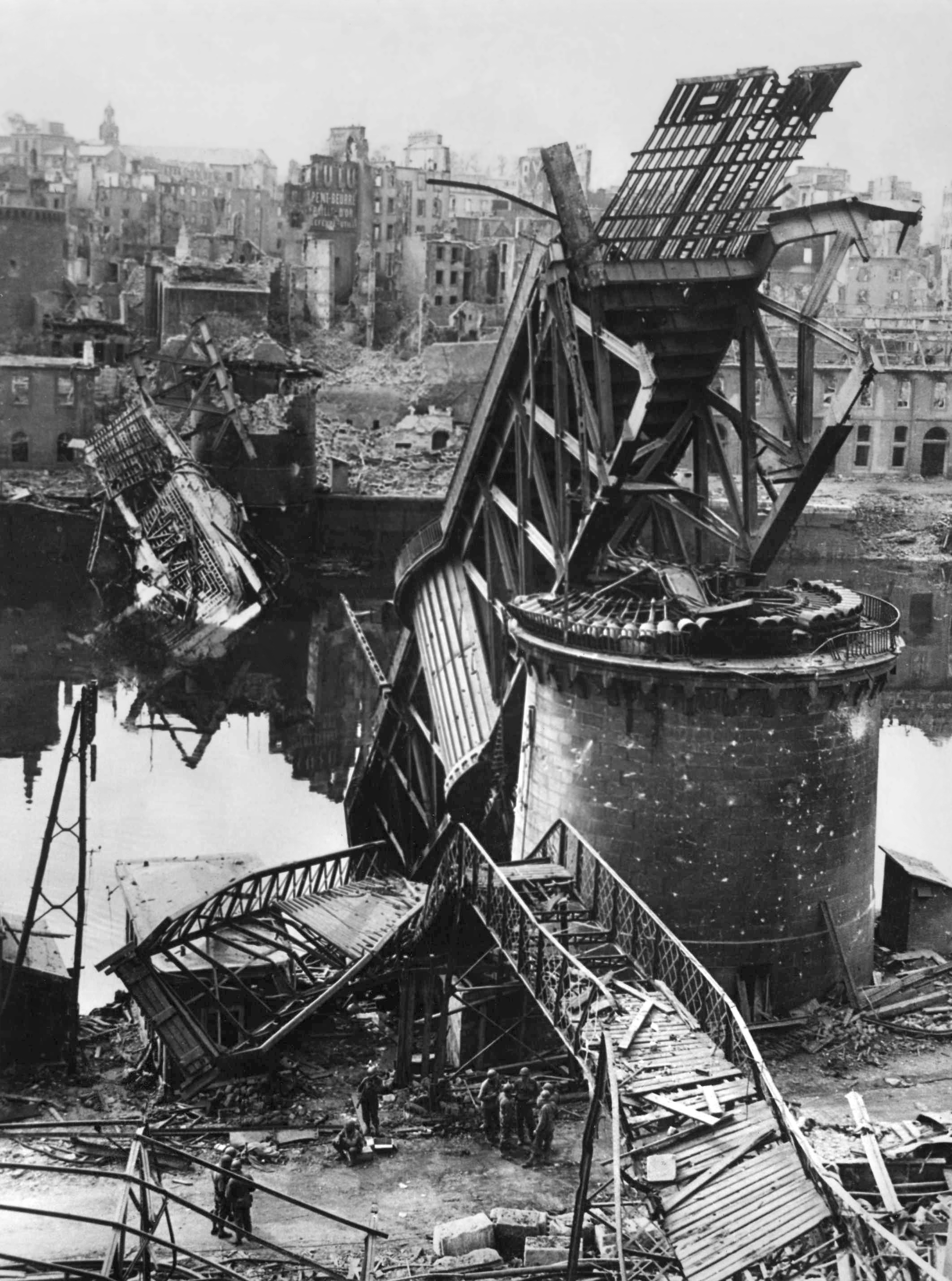 Photographie des destructions de la ville de Brest (France) après les combats de la libération. Vue du du pont National dont les deux travées mobiles plongent dans la Penfeld. A l'arrière-plan Recouvrance avec l'église de Saint-Sauveur. Scan d'une tirage papier en noir et blanc d'une photographique argentique. Dimension 200x250.